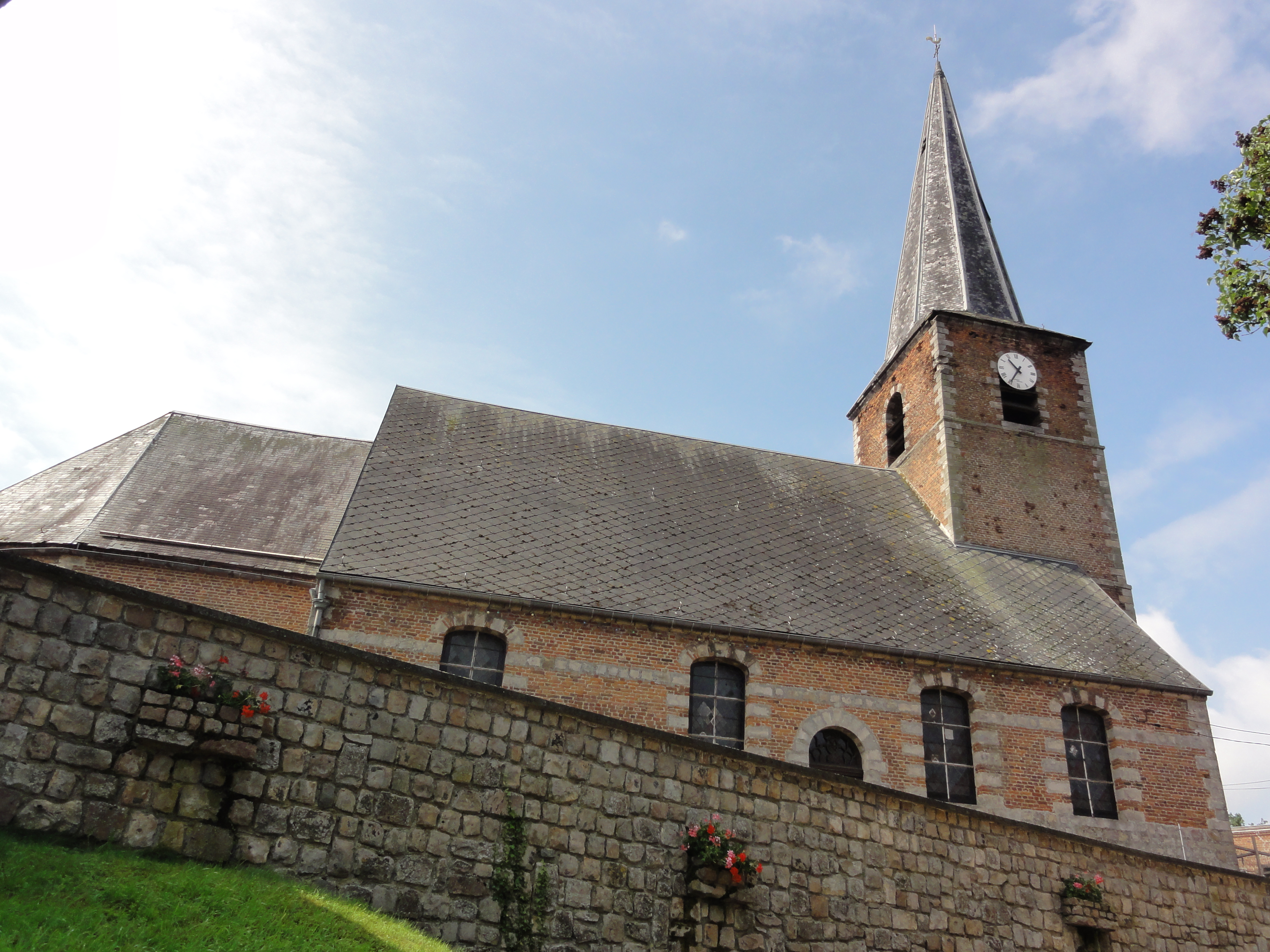 Saint-Martin-sur-Écaillon (Nord, Fr) église, vue latérale